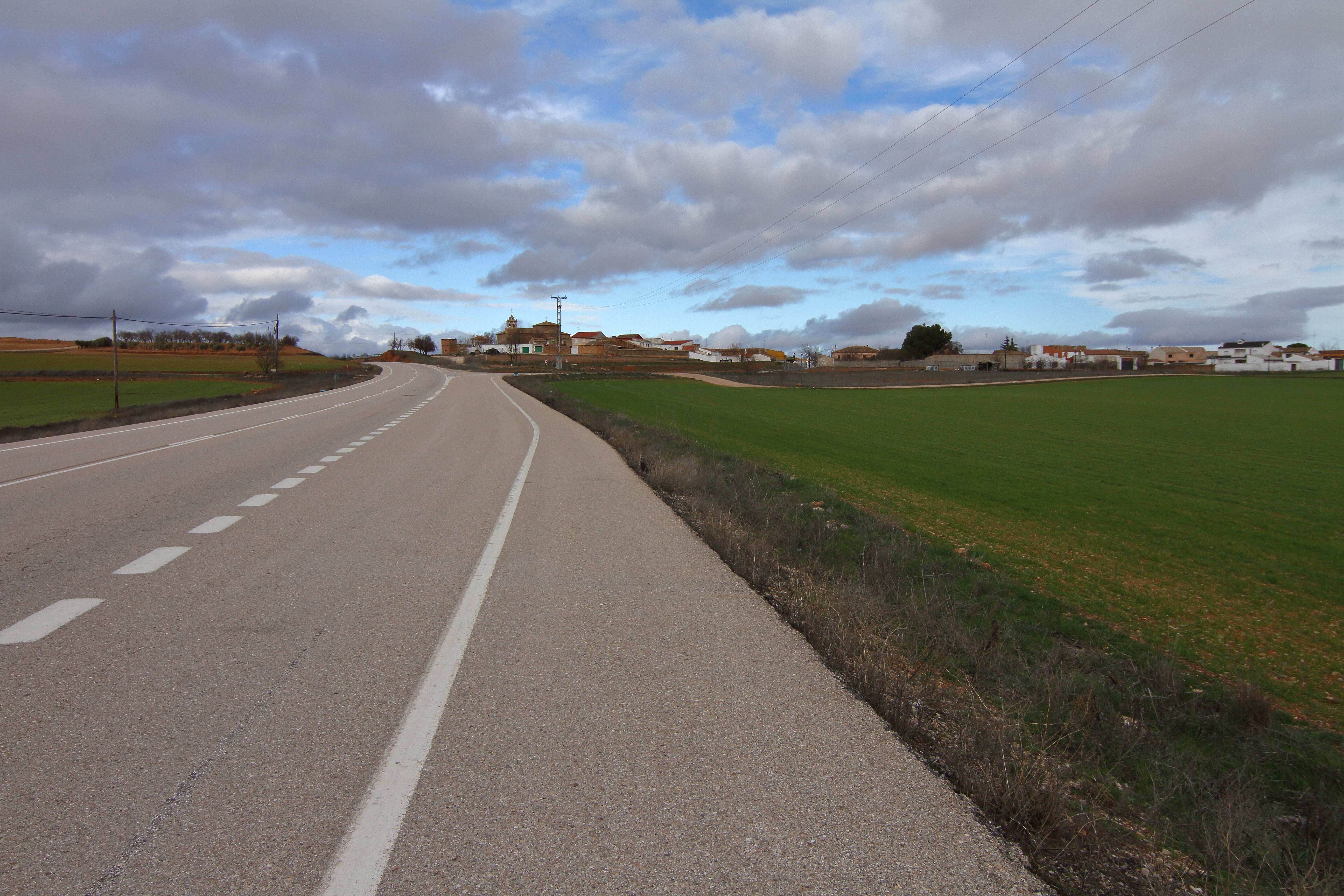 Pozoseco, vista población desde CM-3114